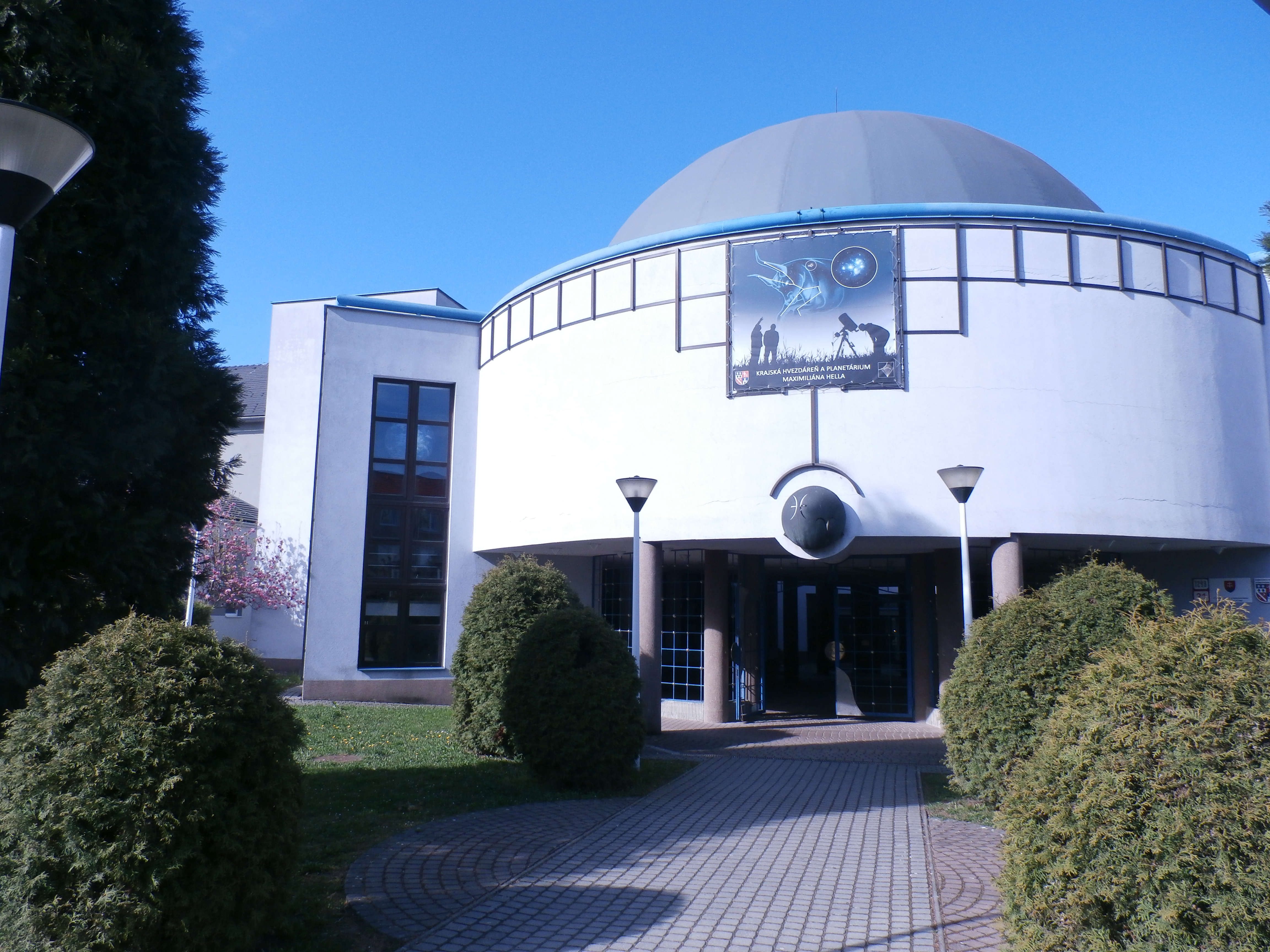 Vstup do budovej Krajskej hvezdárne a planetária Maximiliána Hella v Žiari nad Hronom.